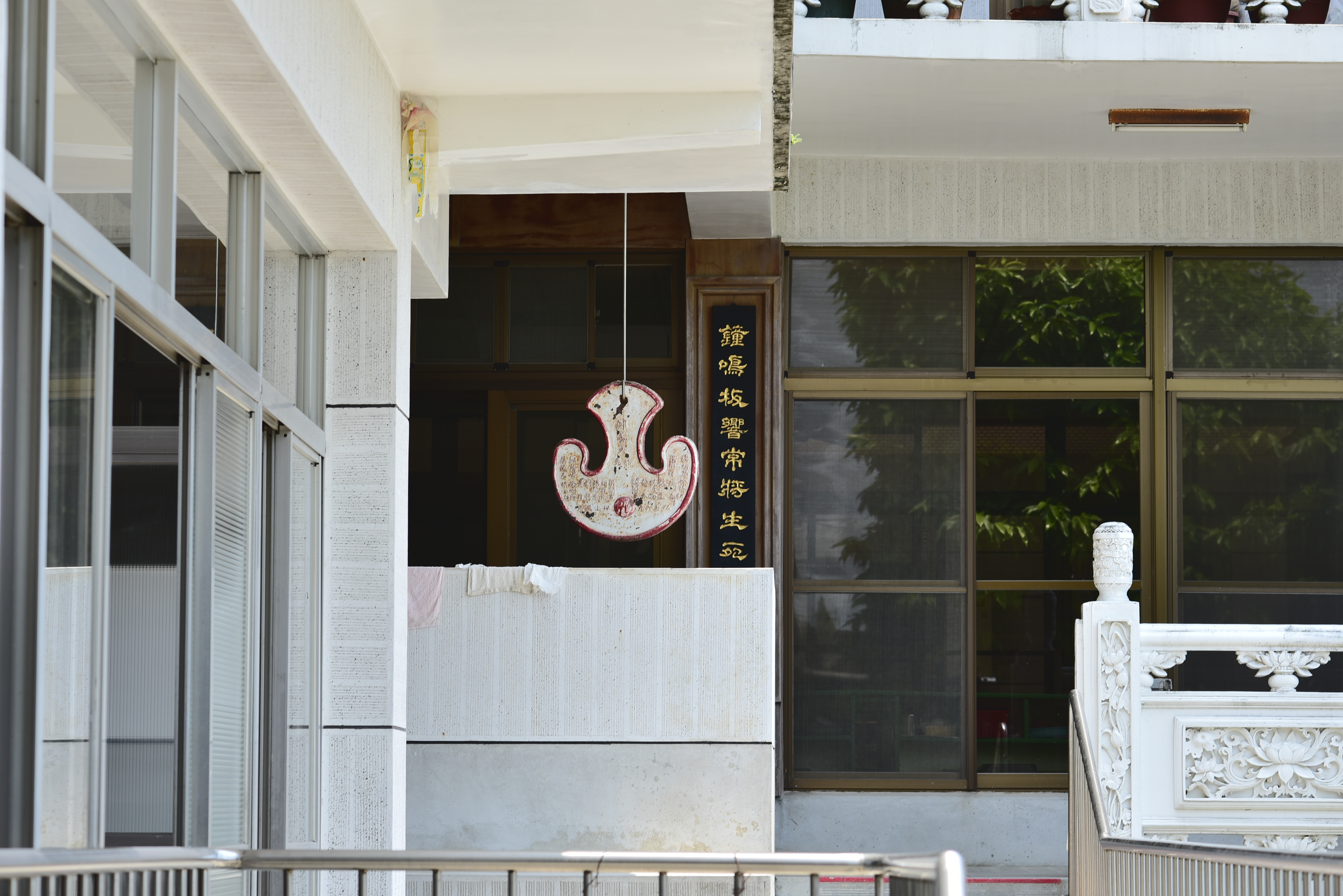 高雄阿蓮大崗山龍湖庵雲板2017